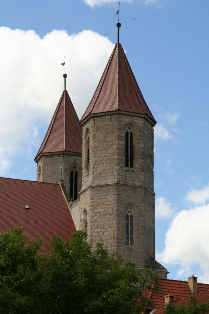 Lwówek Śląski, kościół Wniebowzięcia NMP, stan na 2010 r.